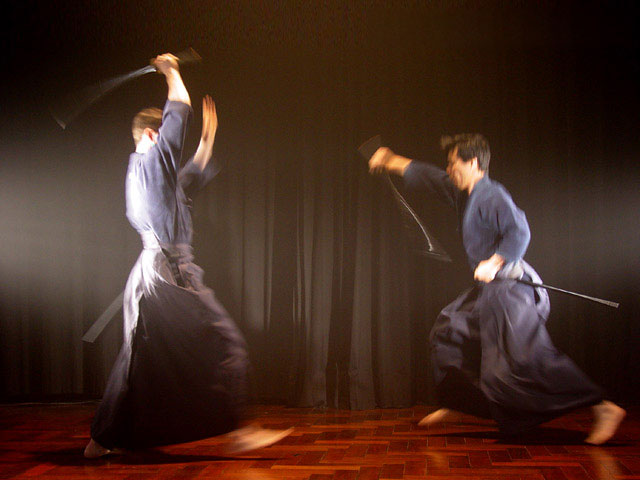 Suio Ryu Kumi Iai (Sensei Jorge Kishikawa and Wenzel Bohm